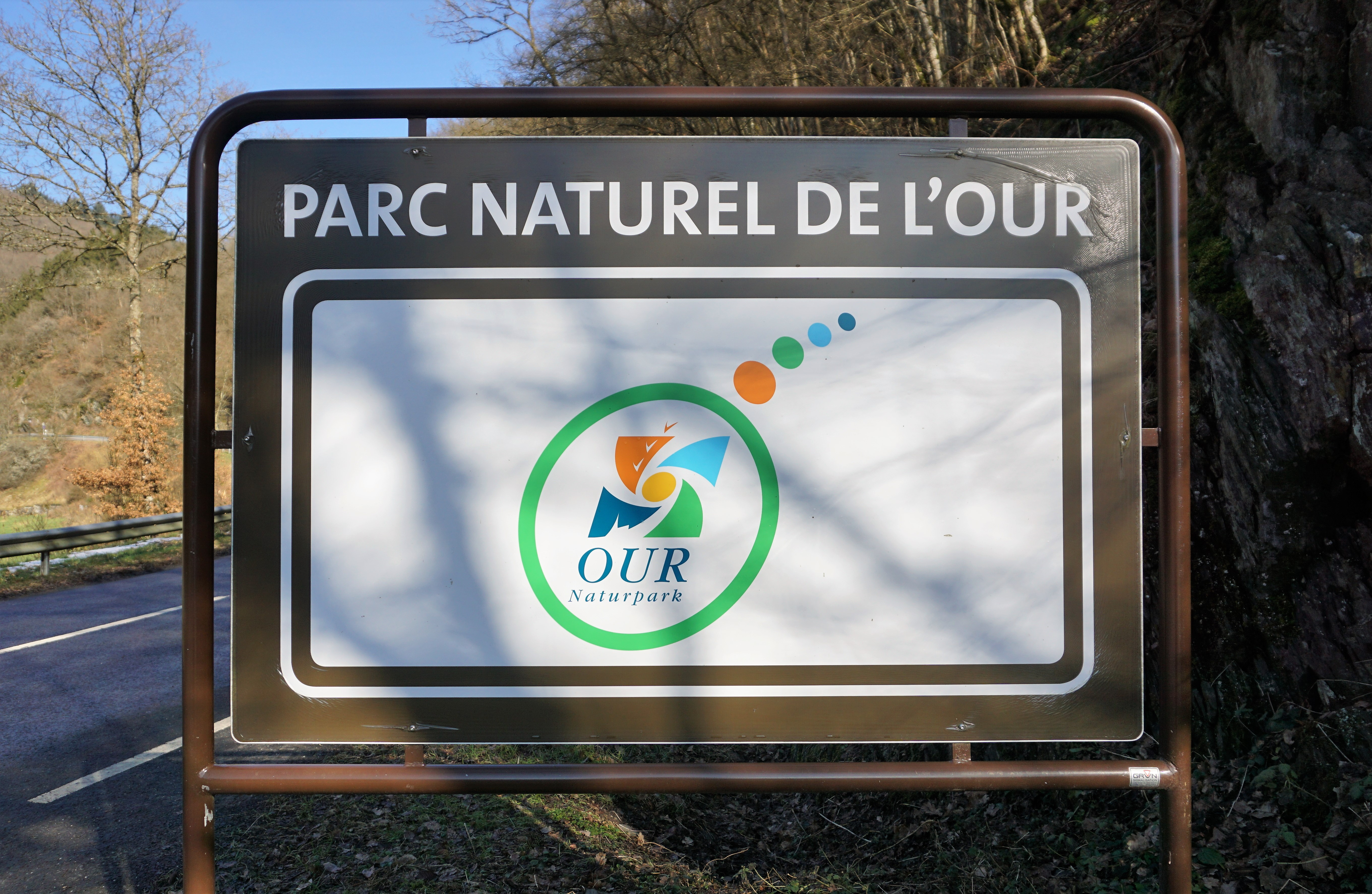 Luxembourg. Panneau indiquant le Parc naturel de l'Our.